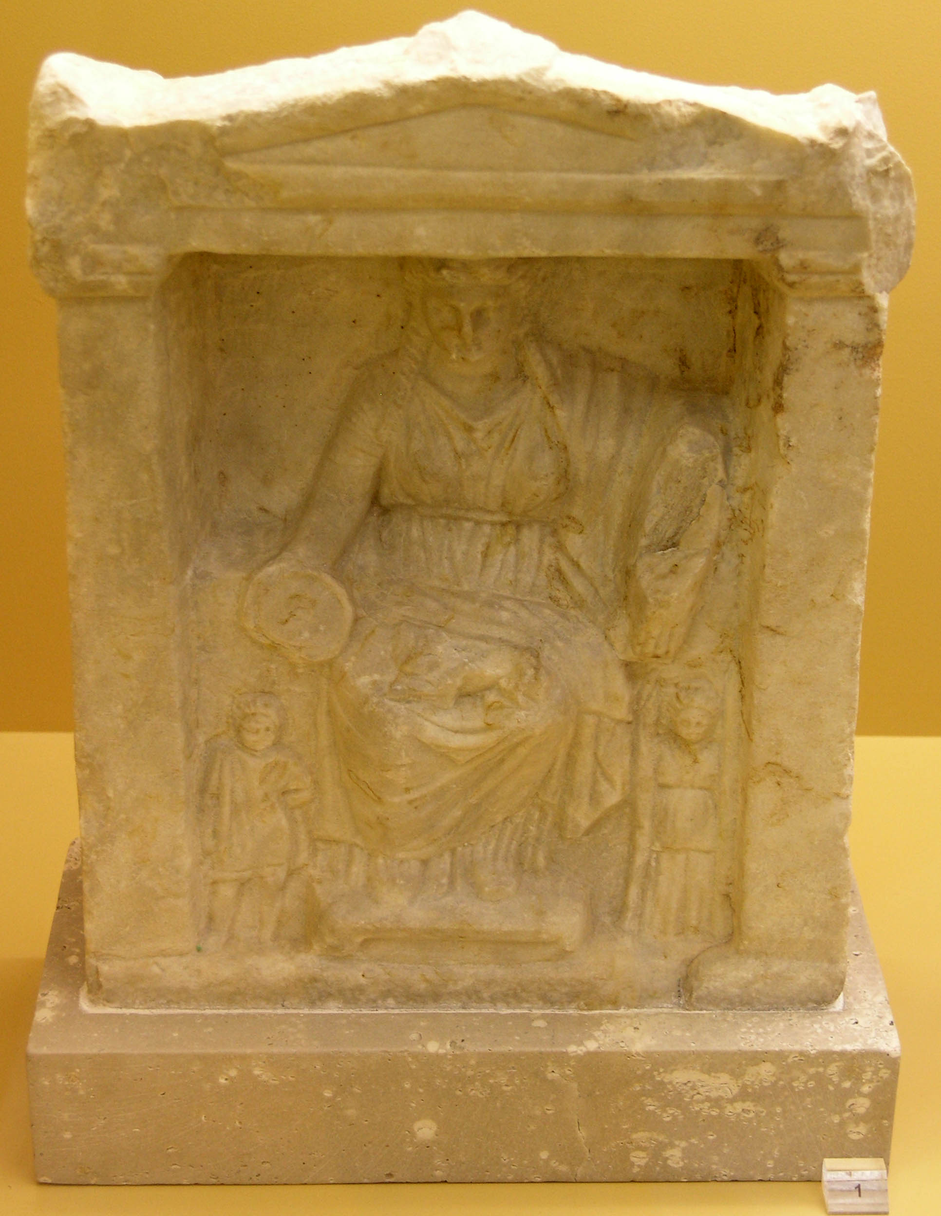 Cybèle trônant dans un naïskos. IVe s. av. J.-C. Musée de l'Agora antique d'Athènes. Photographie prise par Μαρσύας (2005)